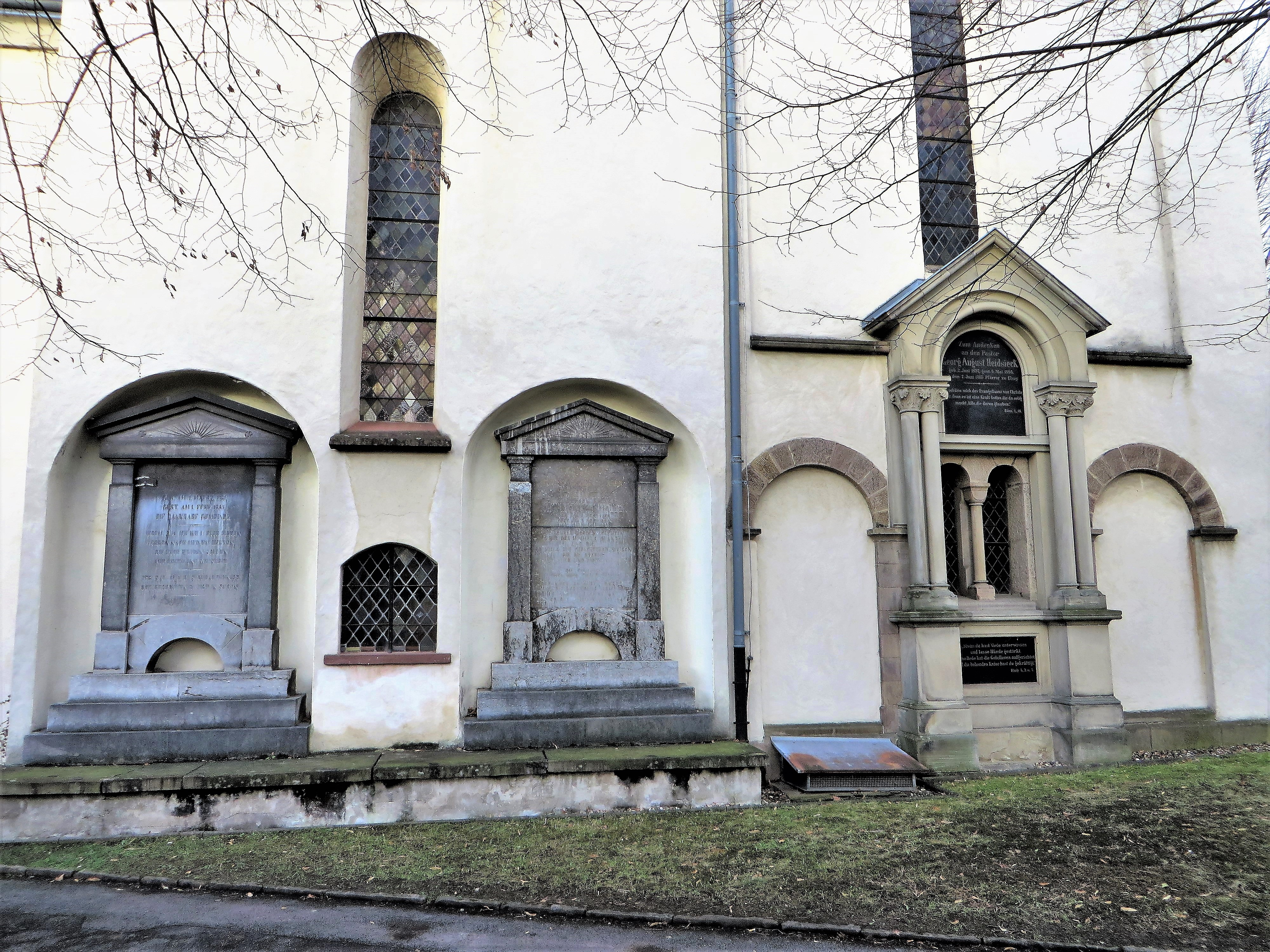 Evangelische Kirche Elsey in Hagen-Hohenlimburg, Elseyer Kirchplatz. Grabdenkmale an der Südostseite. Links: Pastor Dr. Wilhelm Hülsemann (1781–1865); erstellt von Bildhauer Dungs, Elberfeld. Mitte: Prediger Heinrich Friedrich Möller (1716–1805) und sein Sohn Johann Friedrich Möller (1750–1807); feierliche Einweihung am 28. Juli 1816, Entwurf von Wilhelm Tappe, Lüdenscheid, erstellt von Johann Daniel Meyer, Limburg. Rechtes Säulendenkmal: Pastor Georg August Heidsieck (1837–1896); Entwurf von Architekt Fischer, Barmen.